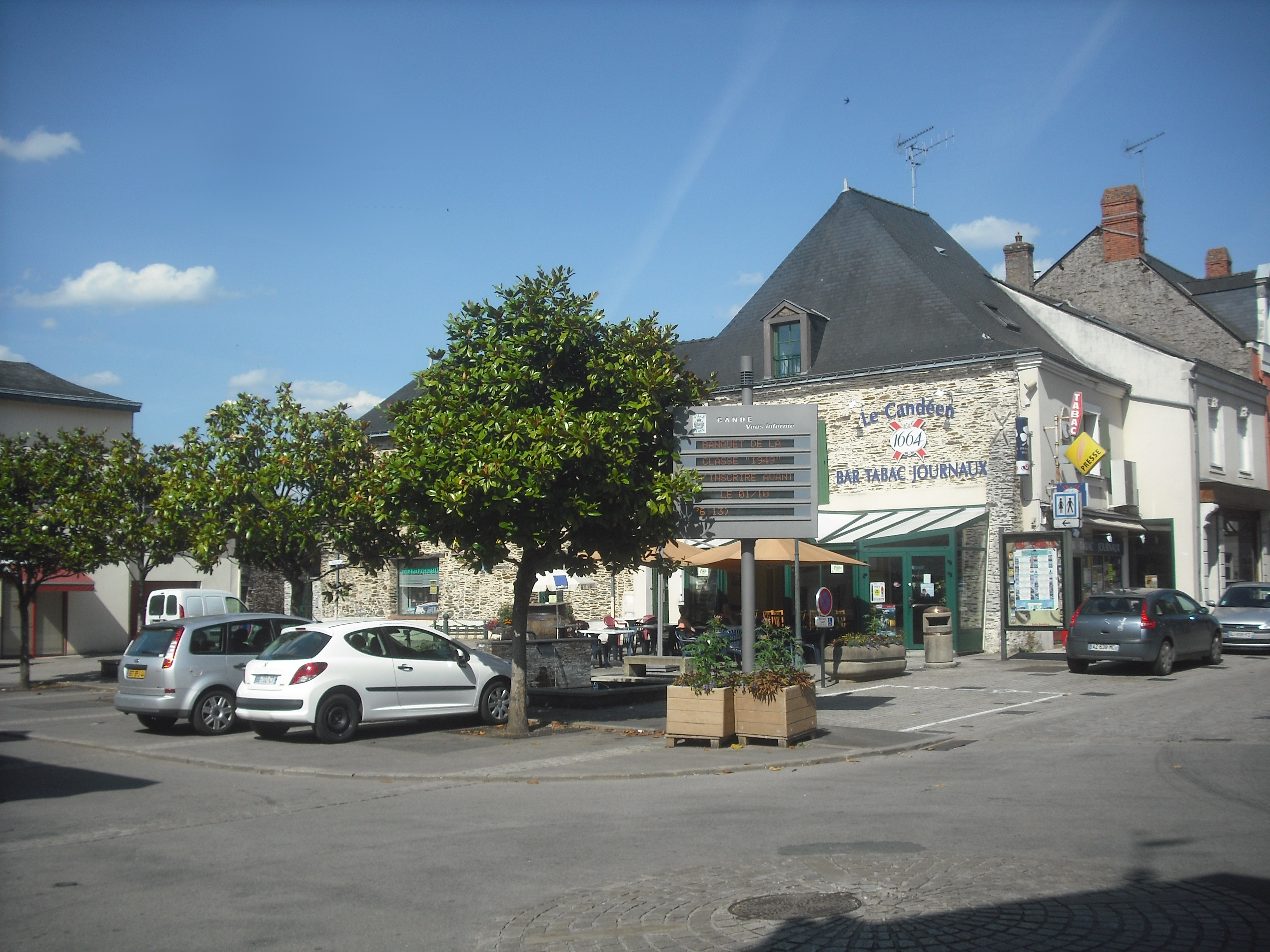 Place du Marché, Candé, Maine-et-Loire, France.